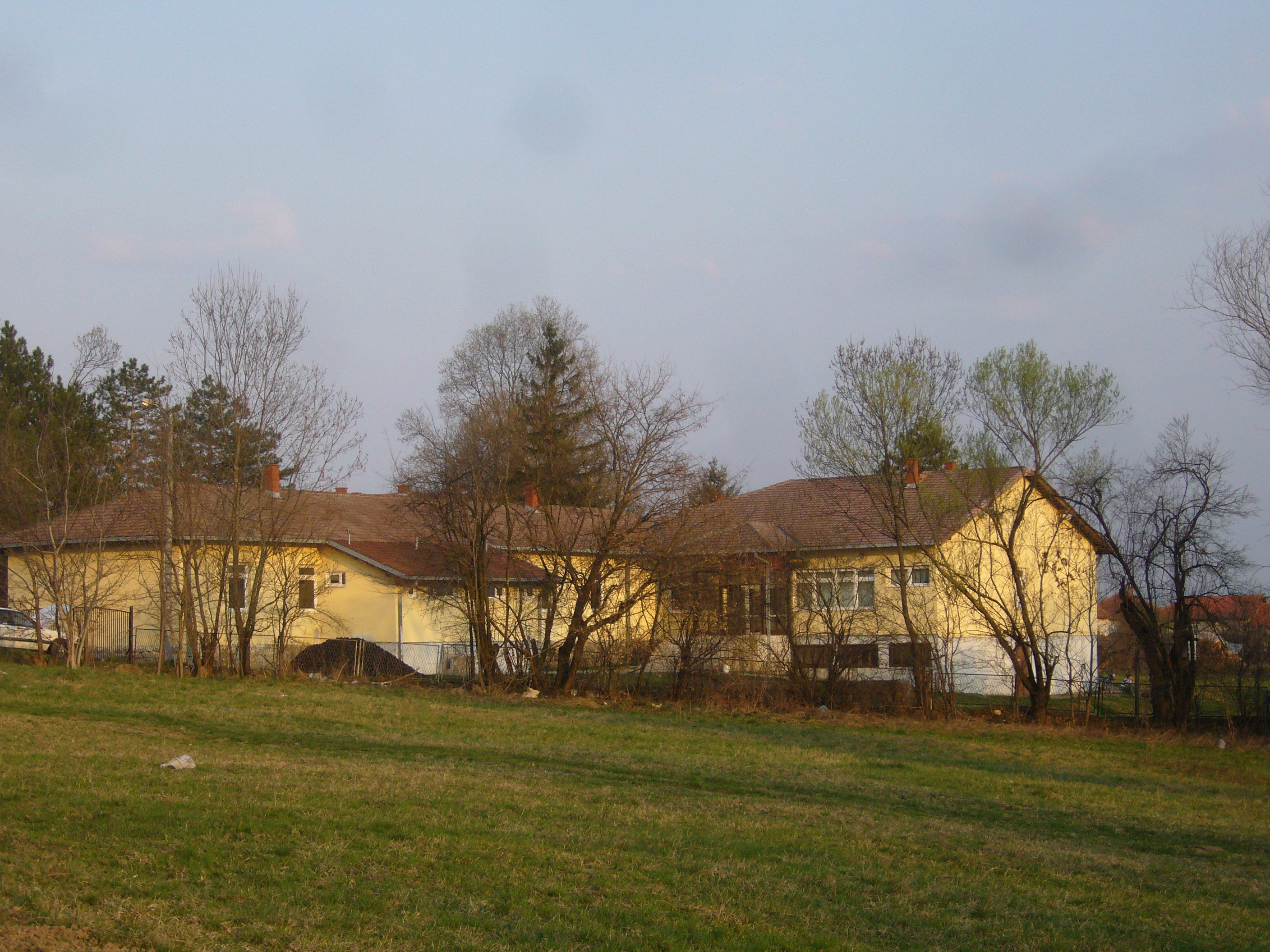 Сеоска школа у Попучкама Licensing